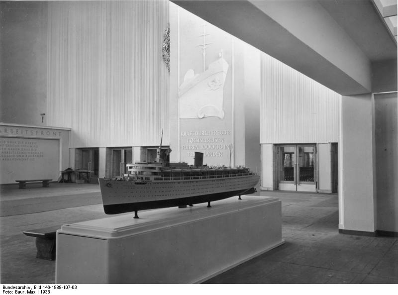 D.A.F.-Ausstellung 1938 "Gesundes Leben, frohes Schaffen"